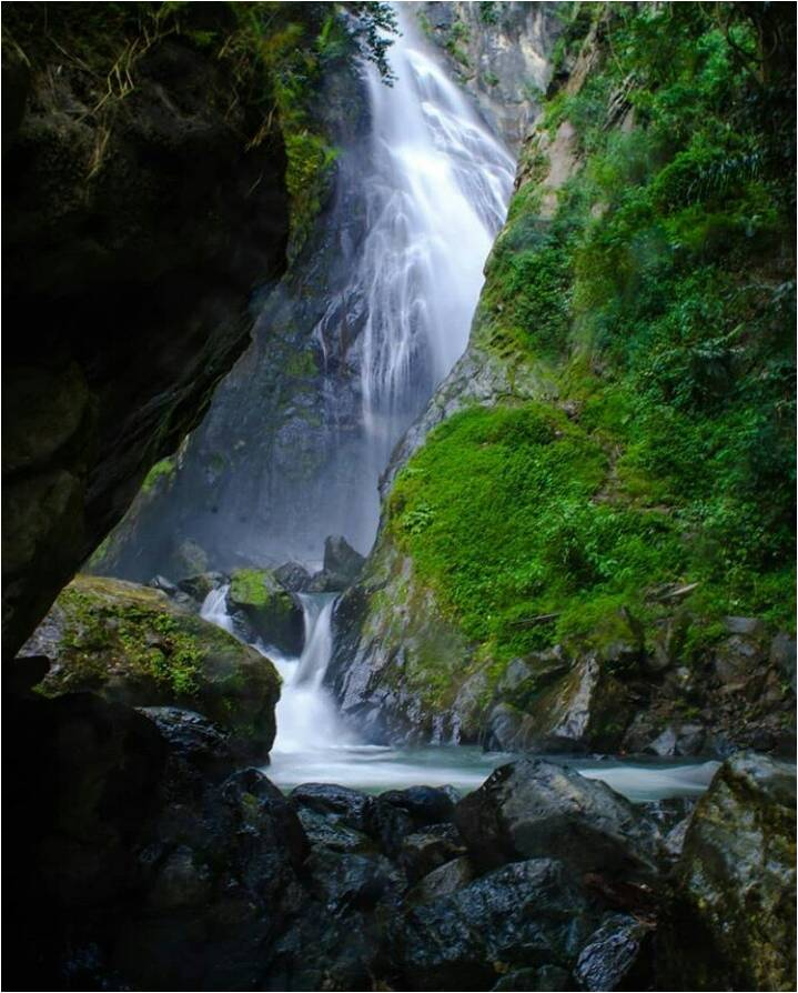 Hijaunya pemandangan dan segarnya percikan air terjun Wera dalam kawasan Taman Wisata Alam Wera yang terletak di Kabupaten Sigi, Sulawesi Tengah